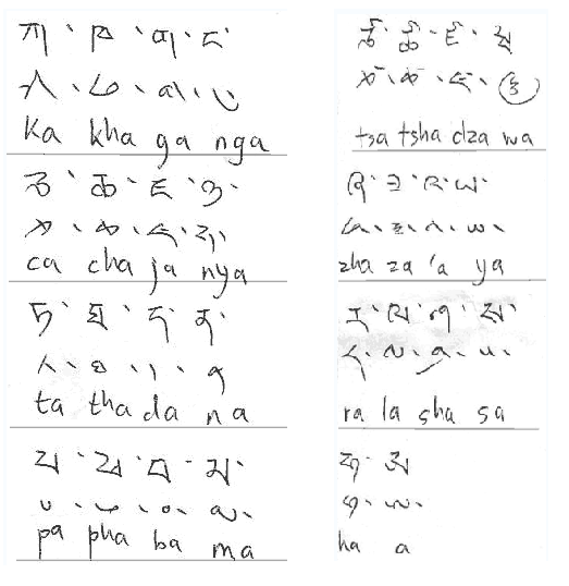 учен, умэ шрифты (Uchen, Umê scripts)